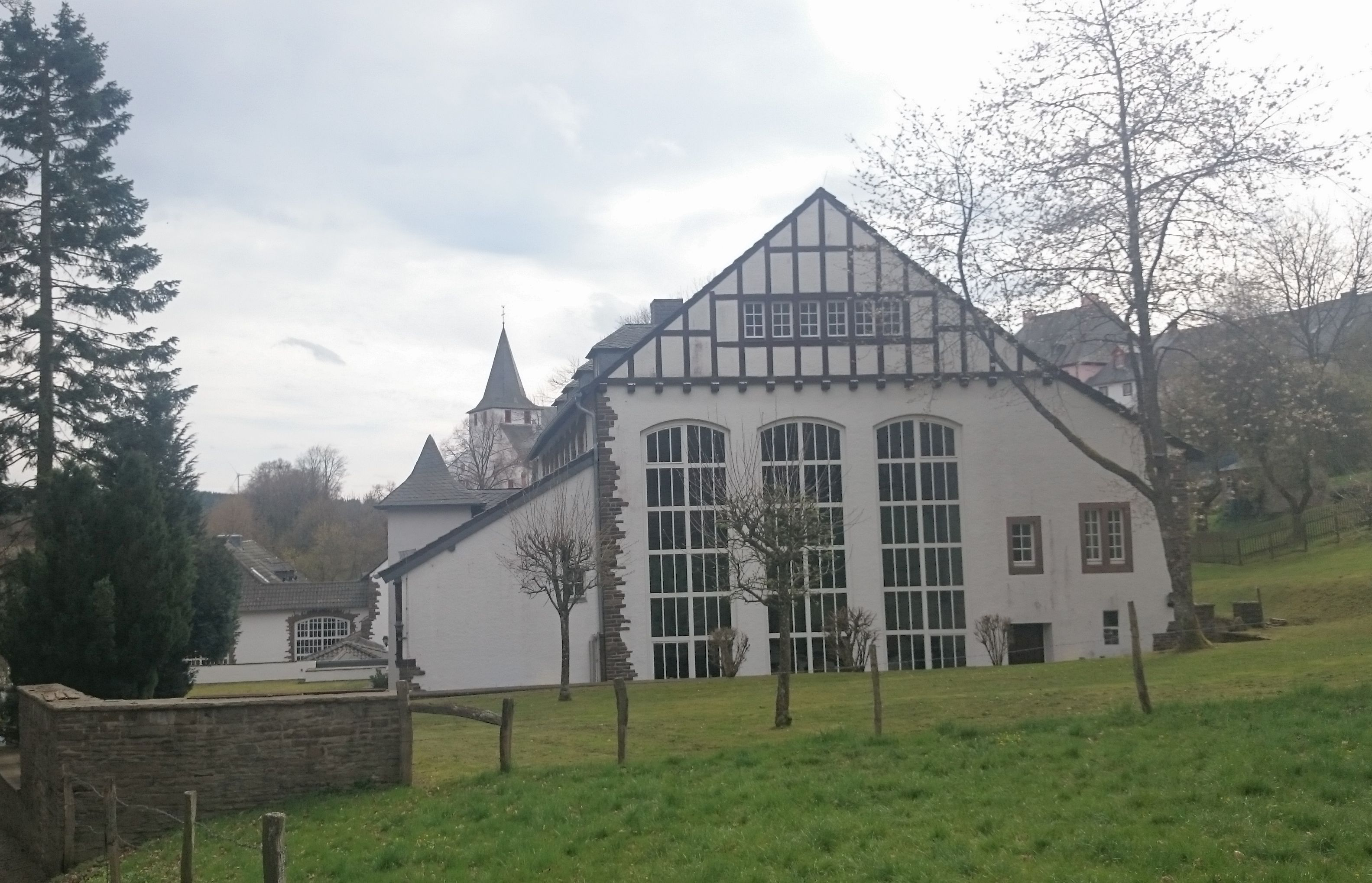 Haus für Lehrerfortbildung Kronenburg (Dahlem), ehemals Hermann-Göring-Meisterschule für Malerei